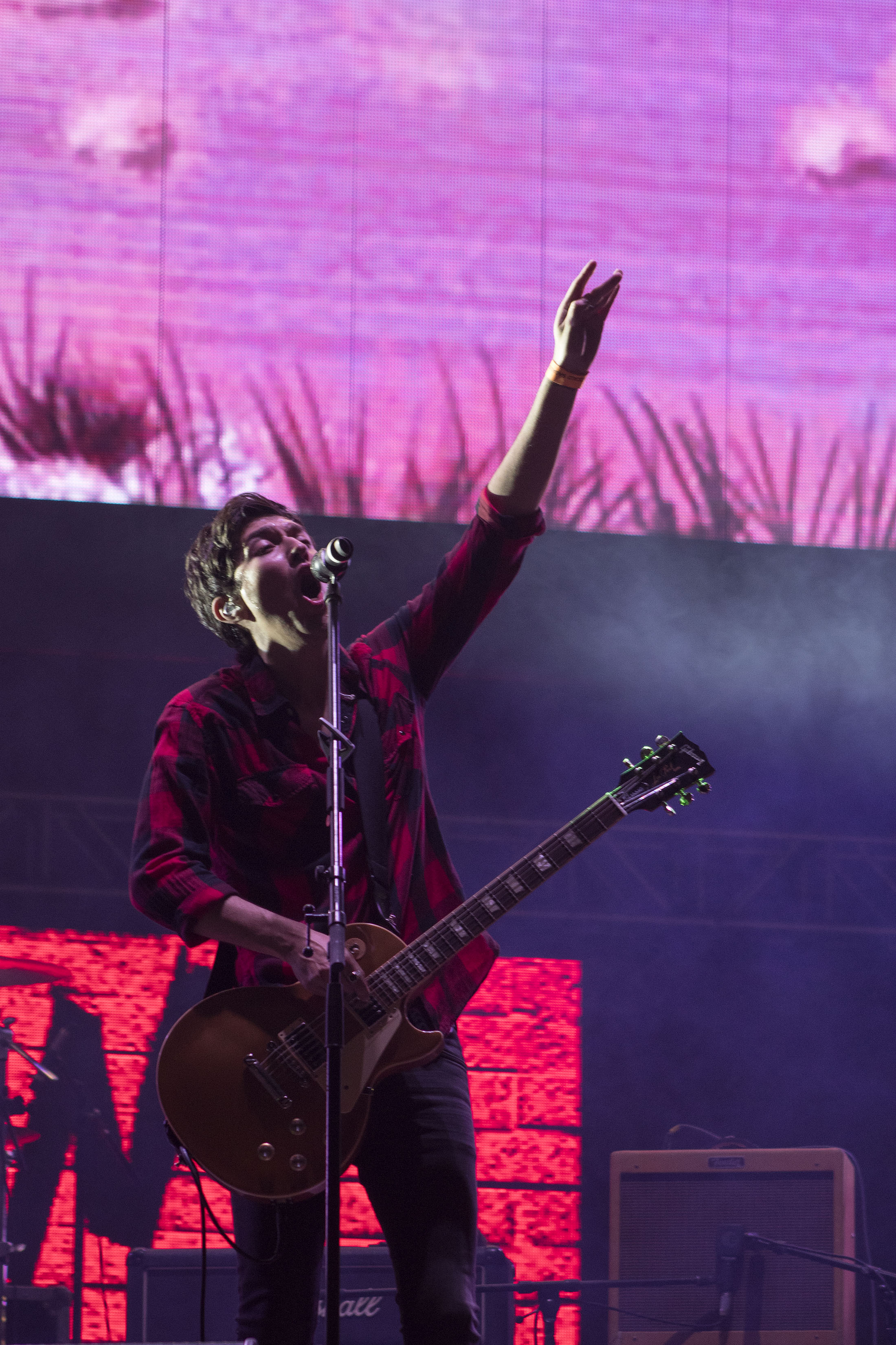 Sábado 12 de noviembre de 2017. Como parte de las actividades de la Semana de las Juventudes del 2017, este sábado 12 de noviembre se desarrolló un segundo concierto masivo en la plancha del Zócalo capitalino. Las bandas que se presentaron en esta ocasión fueron: Marcelo Viejo, Charlie Rodd, Ely Guerra, Dorian, Chetes, La Gusana Ciega, División Minúscula, El Tri y Fatboy Slim. Fotografía: Carlos Luna / Secretaría de Cultura CDMX